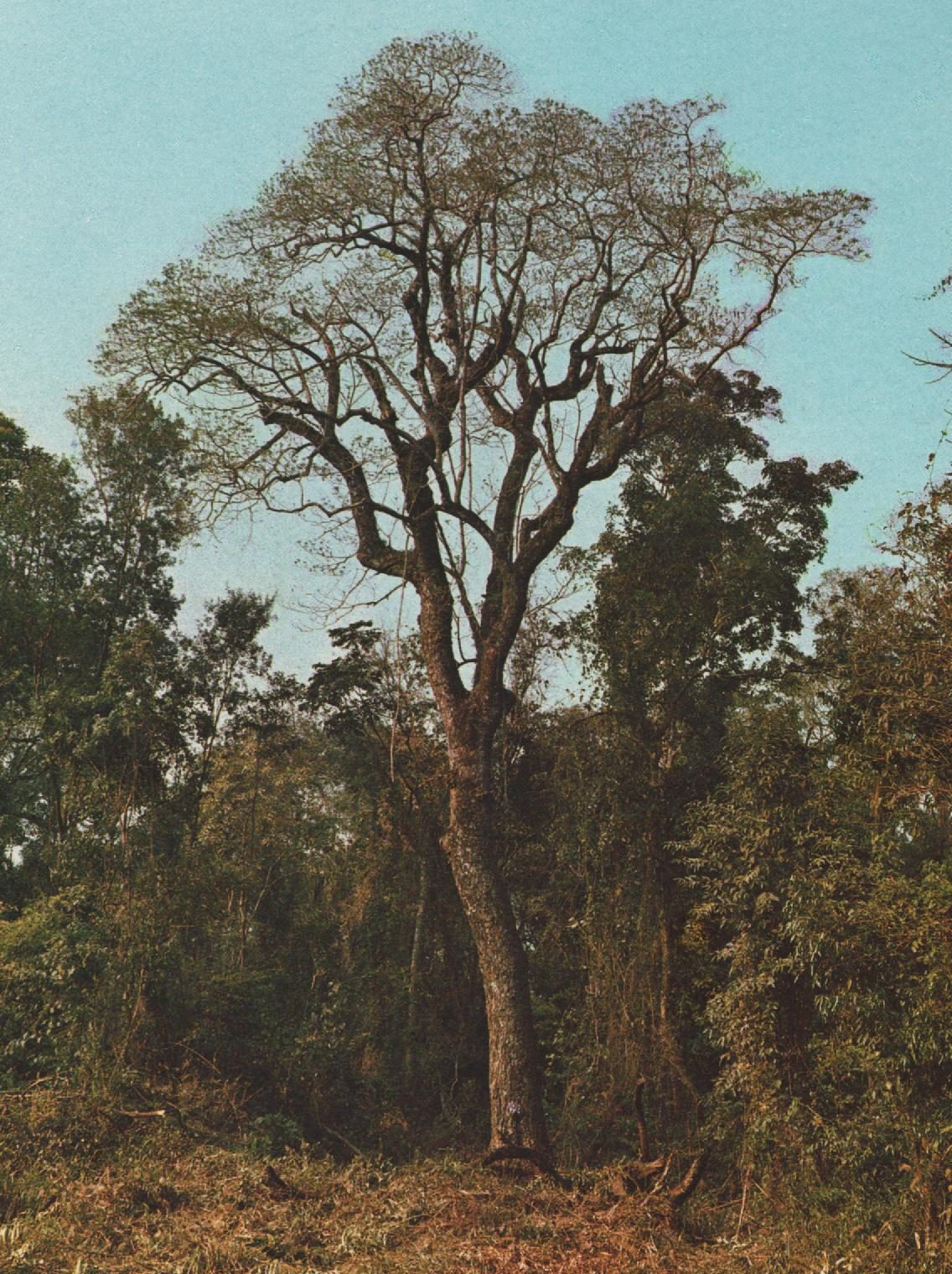 Ejemplar de Myroxylon peruiferum, en Argentina.